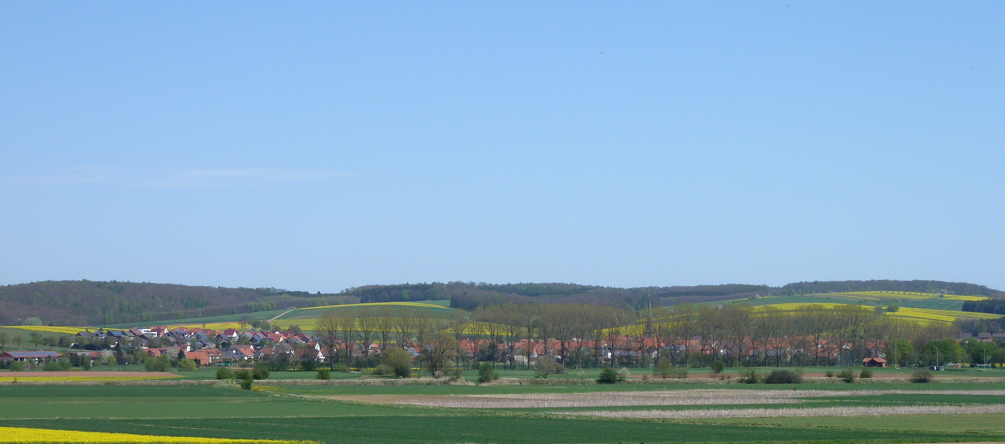 Blick von Westen vom Hang des Roten Berges auf Obernfeld, Landkreis Göttingen, Südniedersachsen. Im Hintergrund Teile der Hellberge